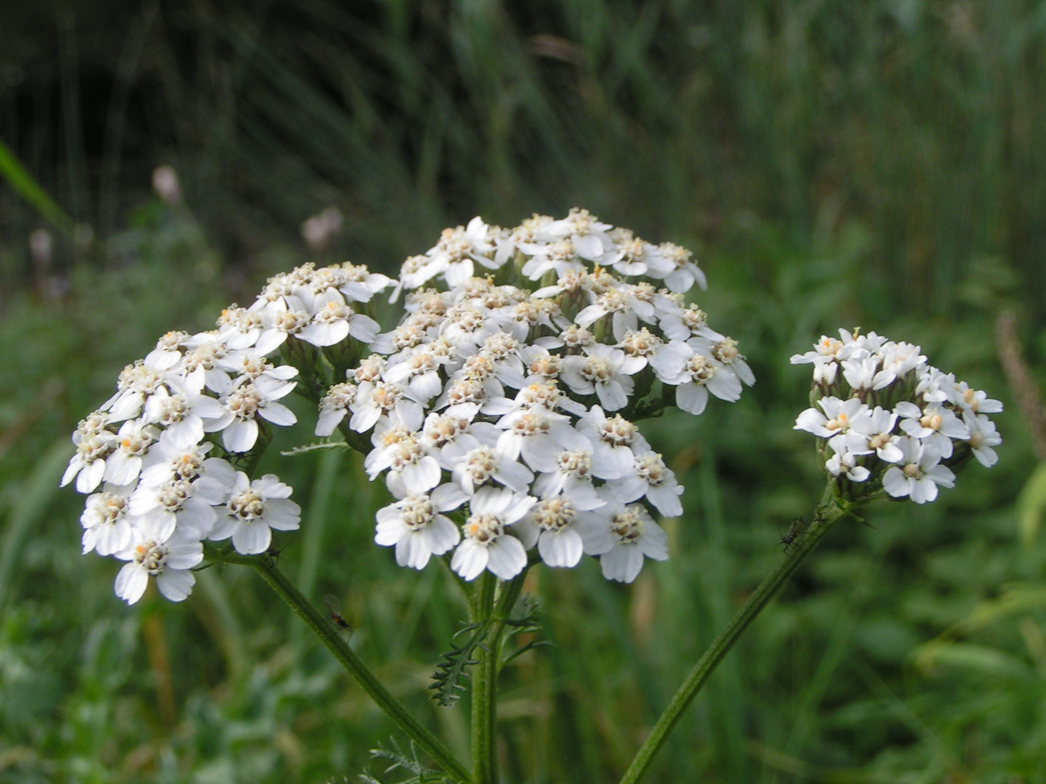 Gemeine Schafgarbe (Achillea millefolium)